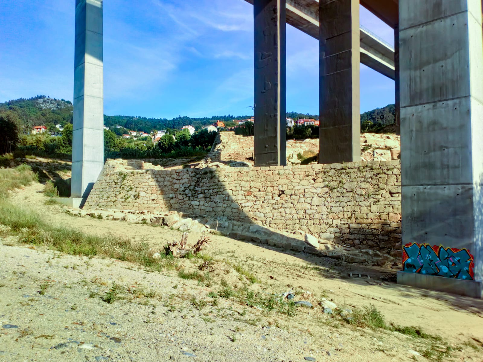 Vista del castillo de Rande (siglo XVII), entre los pilares del puente del mismo nombre.